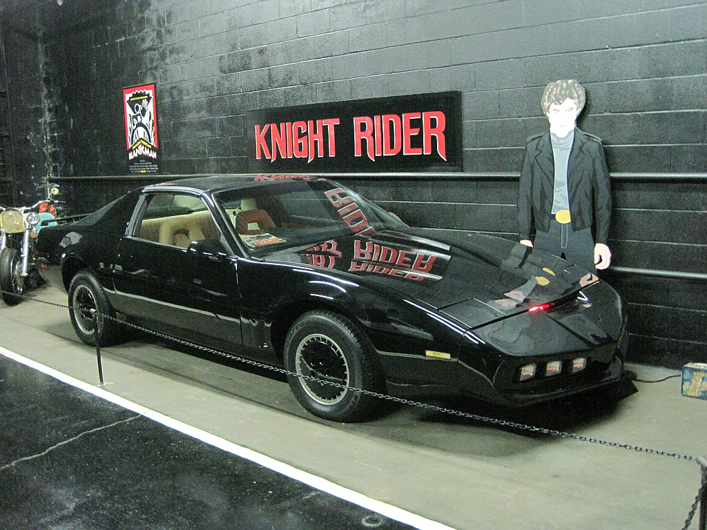 Rusty's TV & Movie Car Museum in Jackson, Tennessee. Knight Rider